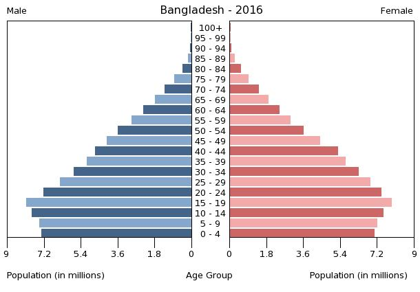 A population pyramid illustrates the age and sex structure of a country's population and may provide insights about political and social stability, as well as economic development. The population is distributed along the horizontal axis, with males shown on the left and females on the right. The male and female populations are broken down into 5-year age groups represented as horizontal bars along the vertical axis, with the youngest age groups at the bottom and the oldest at the top. The shape of the population pyramid gradually evolves over time based on fertility, mortality, and international migration trends.